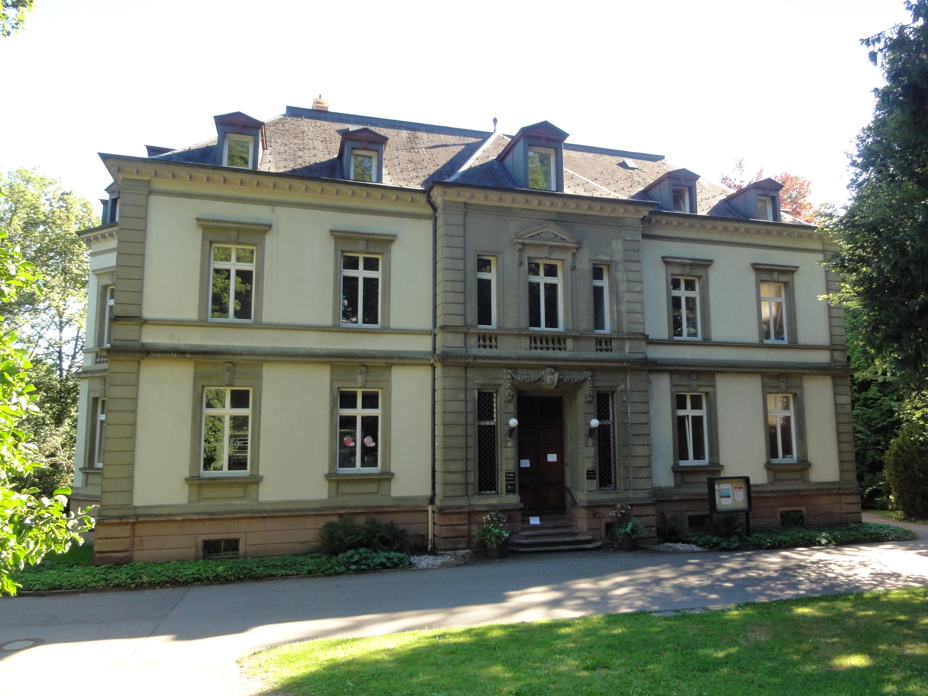 Bad Säckingen: Villa Berberich (Mineralmuseum und Restauration), oberhalb des Stadtparks